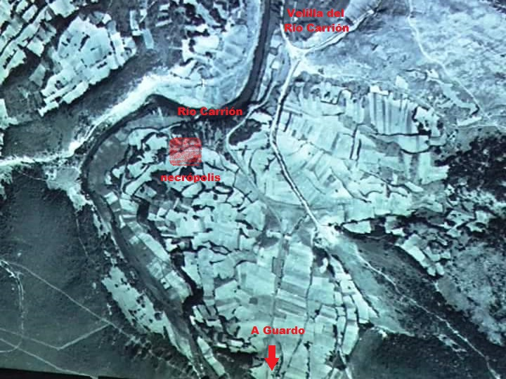 Vista aérea de la localidad de Velilla del Río Carrión, en España, tomada en 1952 por aviones de la Fuerza Aérea de los Estados Unidos.